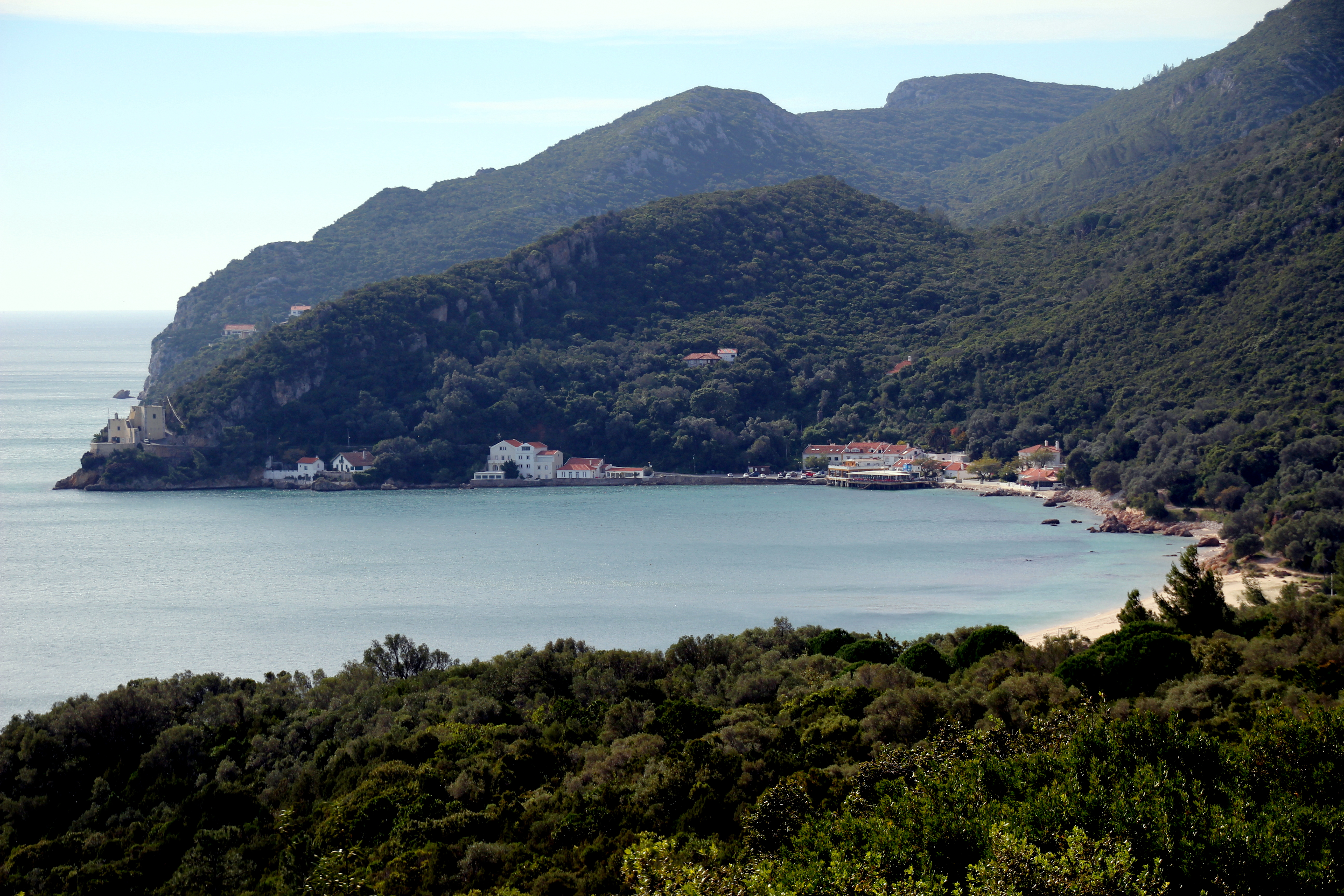 Serra da Arrábida This is a photography of a Site of Community Importance in Portugal with the ID: PTCON0010. Natura2000 entry, EEA entry